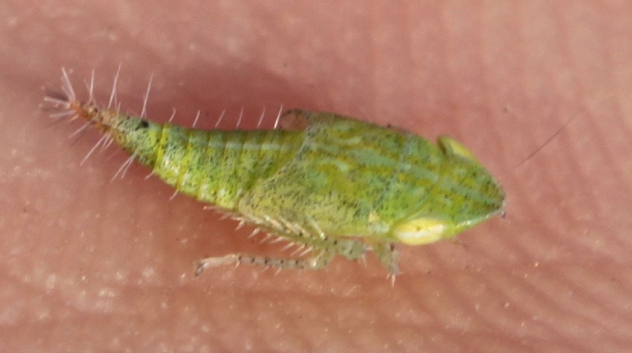 Nymphe der Südlichen Strauchzirpe (Fieberiella florii) am 21. April 2018 südlich Mannheim